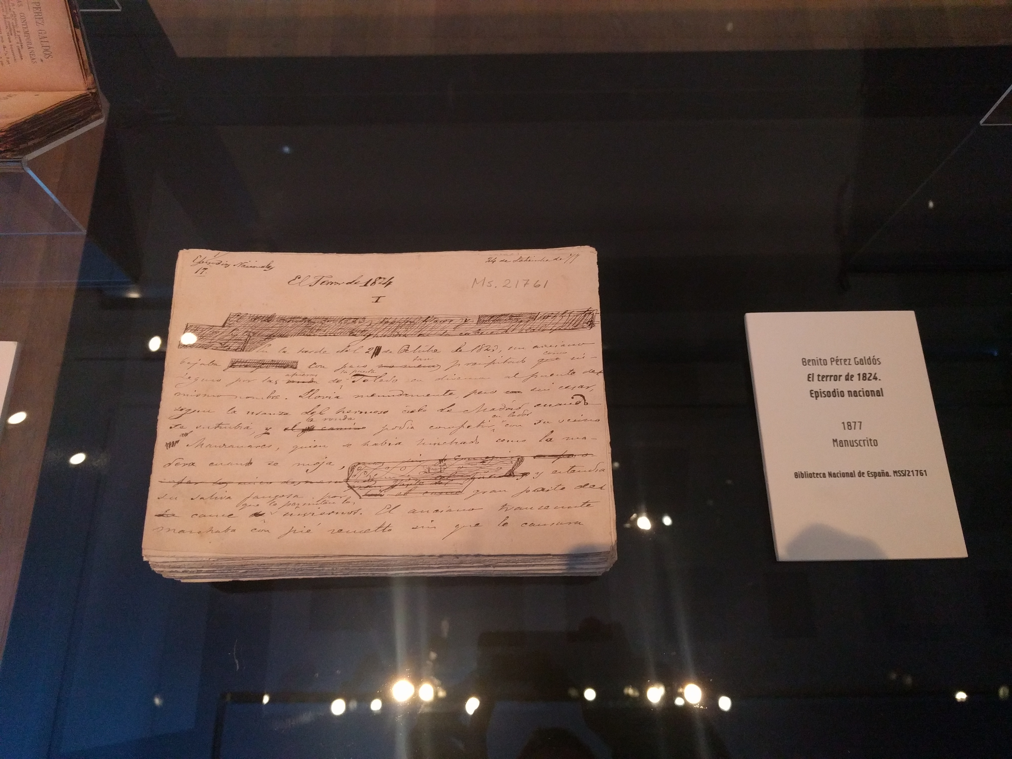 Manuscrito de El terror de 1824 de Benito Pérez Galdós, 1877. Biblioteca Nacional de España.